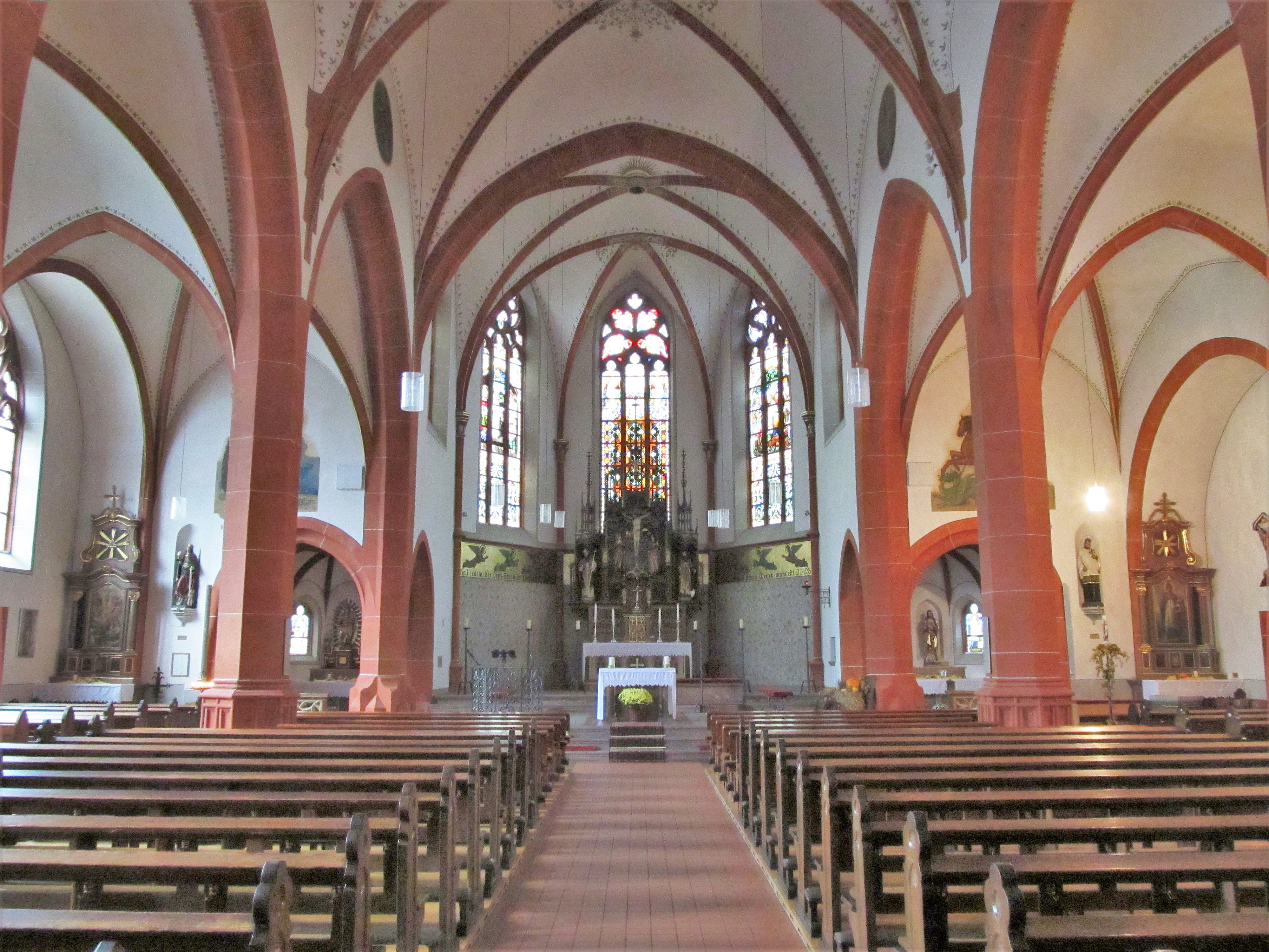 Blick ins Innere der katholischen Pfarrkirche St. Willibrord in Limbach, einem Ortsteil der Gemeinde Schmelz, Landkreis Saarlouis, Saarland